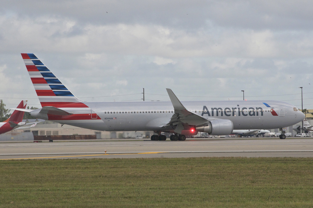 Boeing 767 de American, carreteando en el Aeropuerto Internacional de Miami.